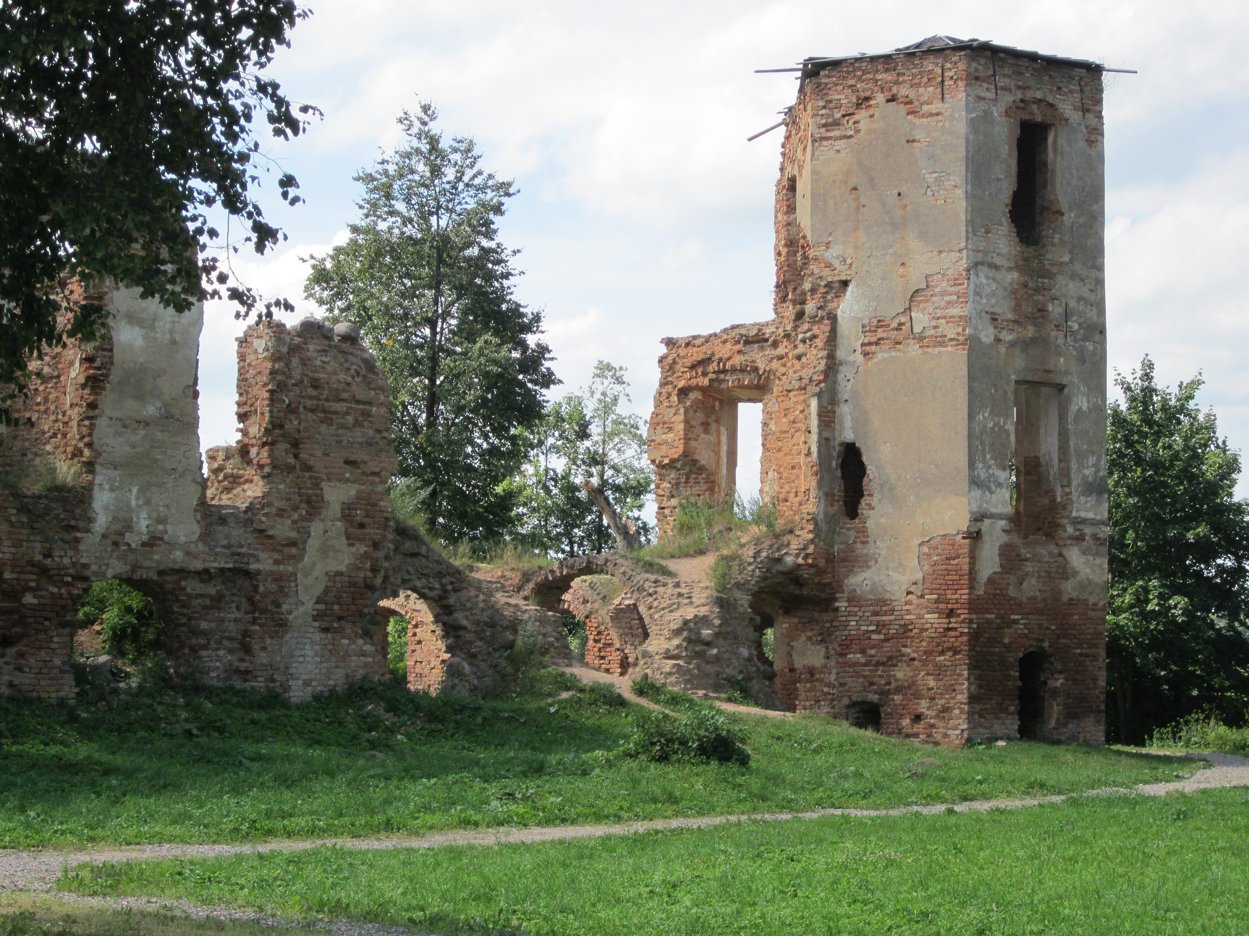 Беларуская (тарашкевіца): Руіны былога замка Сапегаў з фрагмэнтамі абарончых збудаваньняў. в. Гальшаны This is a photo of Belarusian heritage monument. Reference number: 412Г000064 ( WLM)